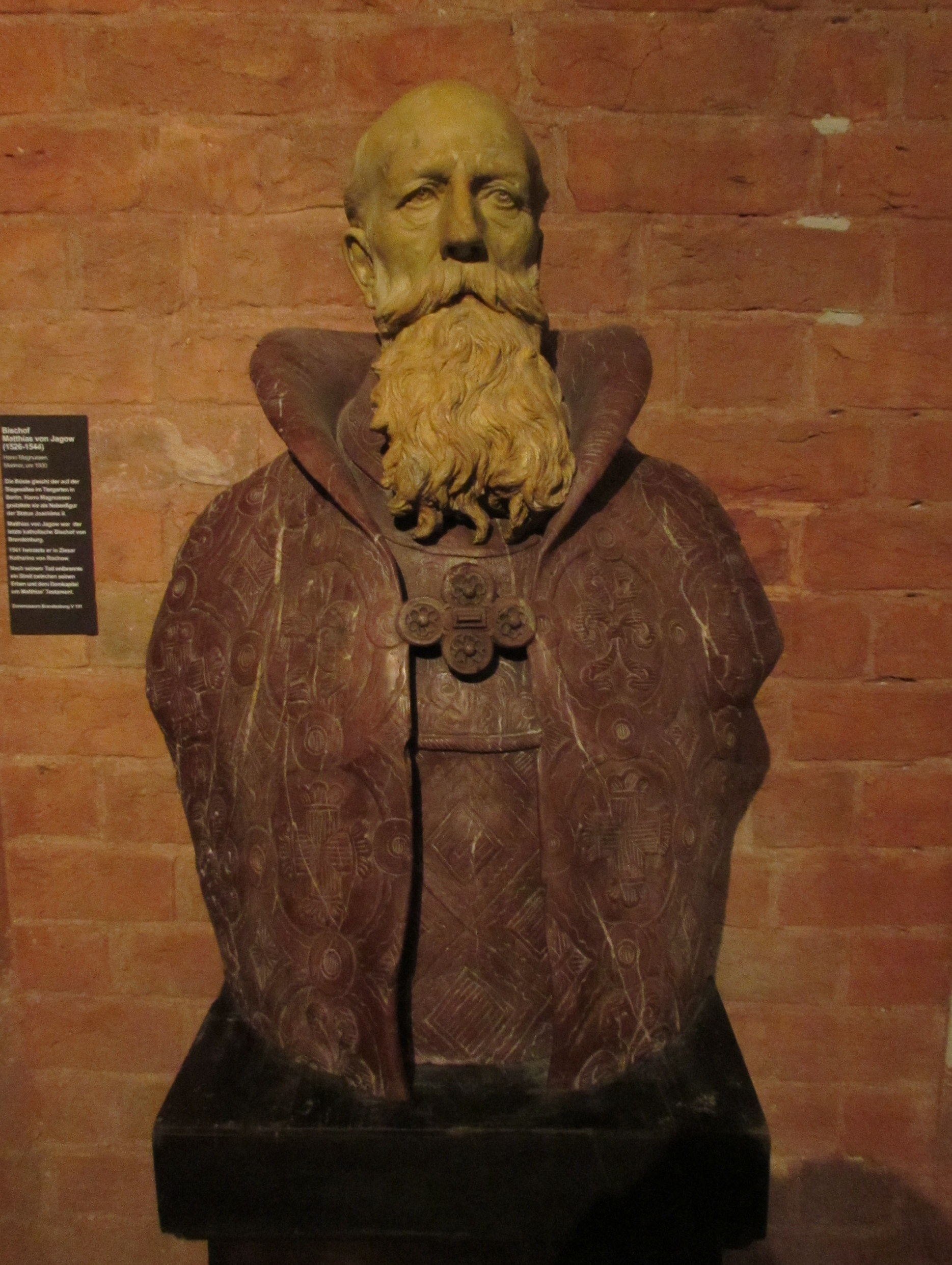 büste des bischofs matthias von jagow, mamor, erstellt von harro magnussen, "um 1900", dommuseum brandenburg